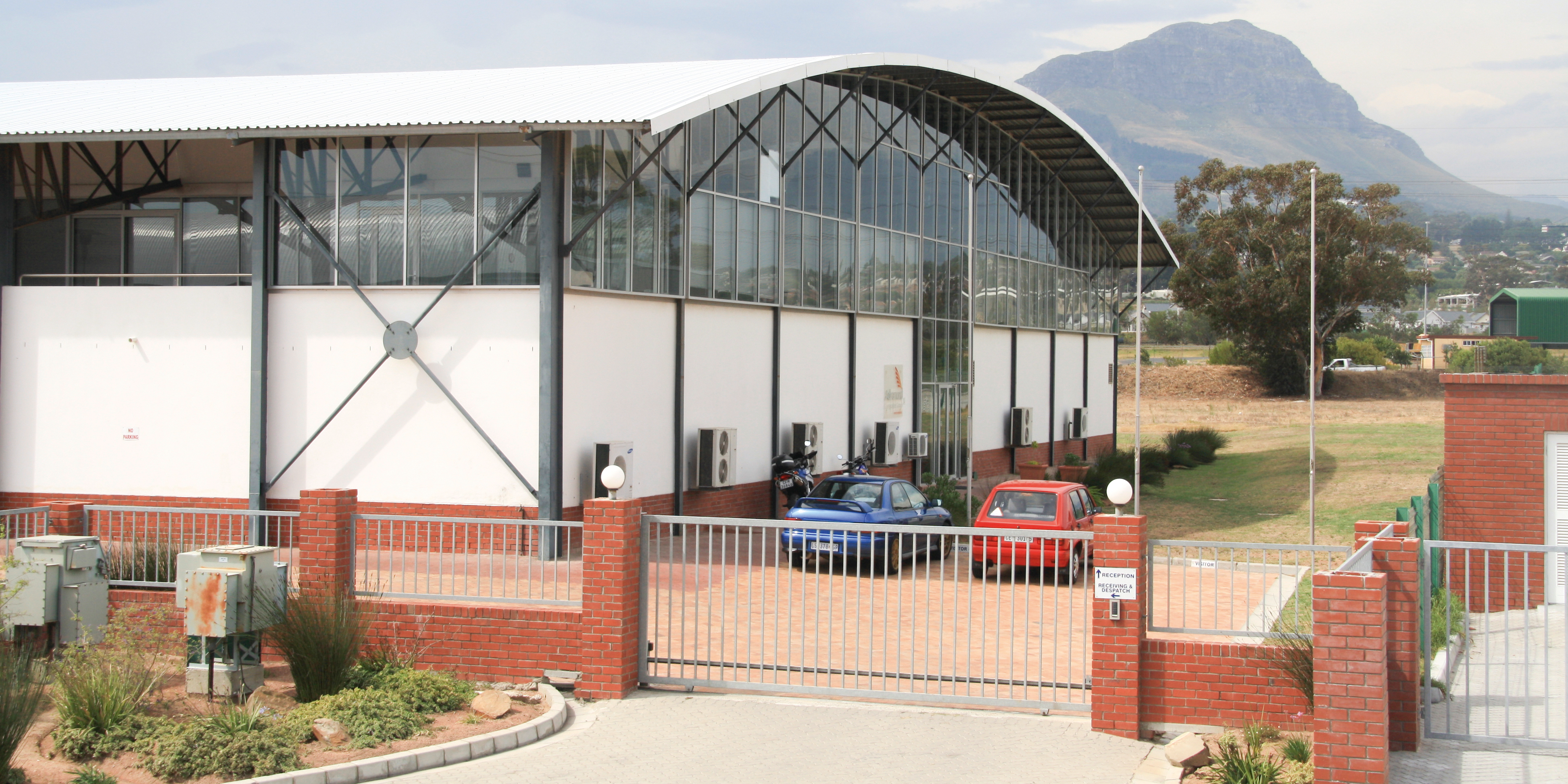 RECARO Aircraft Seating, Firmengebäude Südafrika